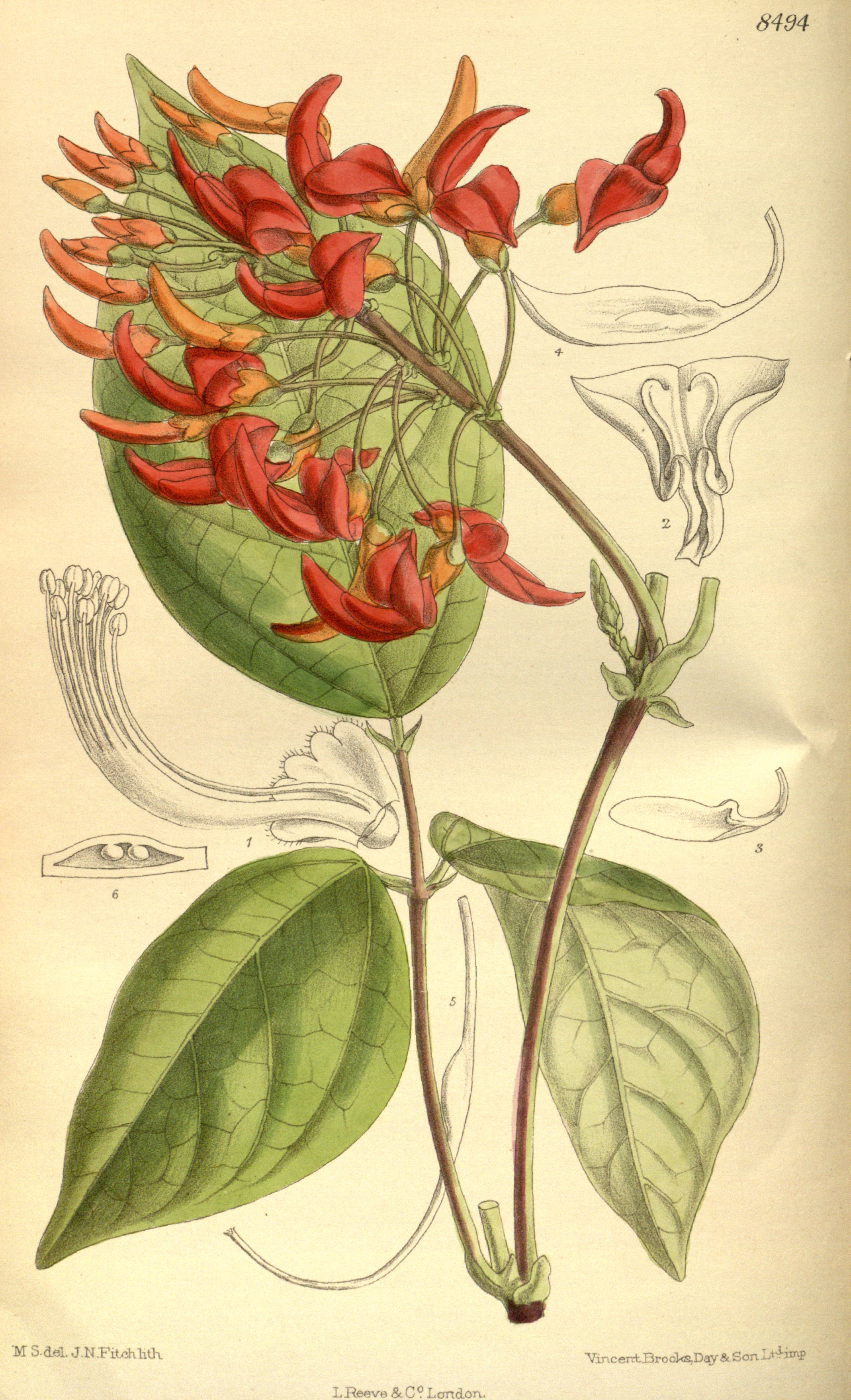 Strongylodon pseudolucidus (= Strongylodon lucidus), Fabaceae, Faboideae